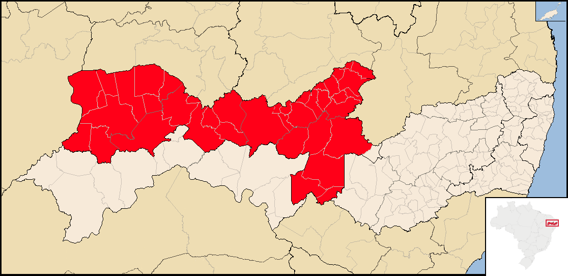 Localização da Mesorregião do Sertão Pernambucano em Pernambuco.